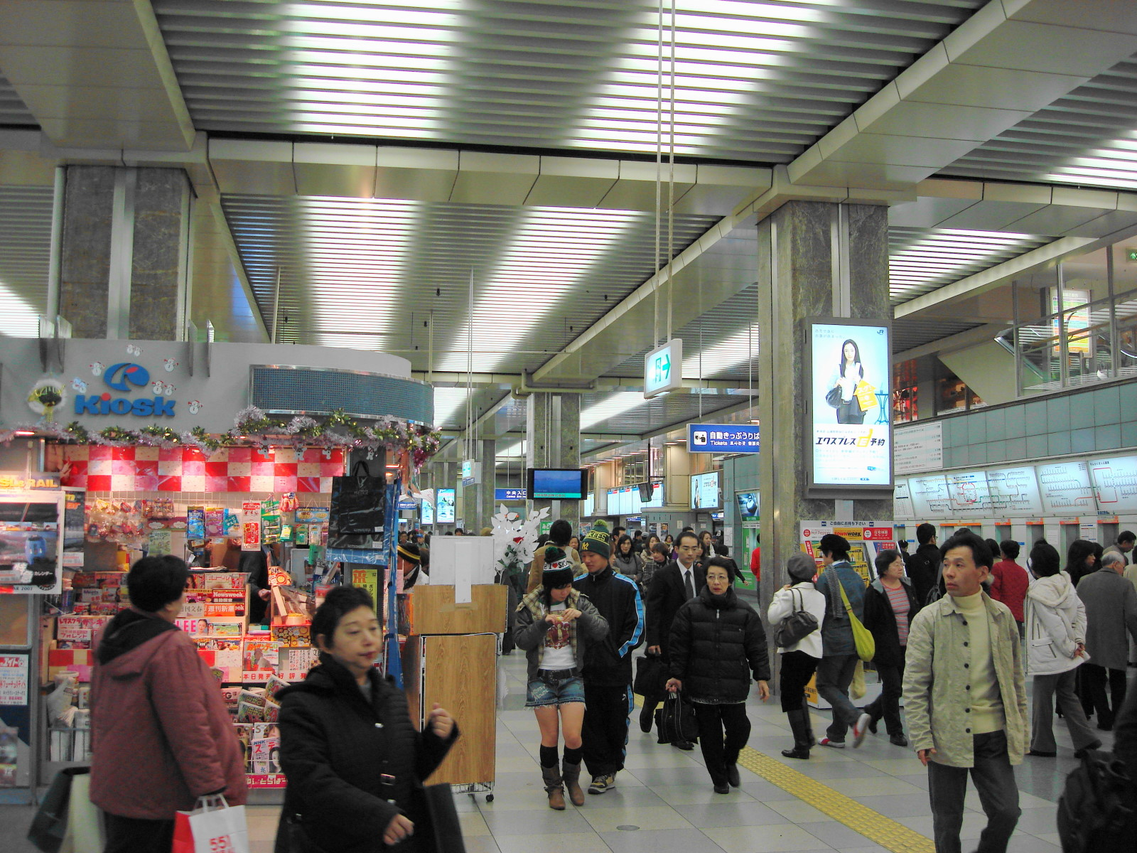 JR-TennjiSta